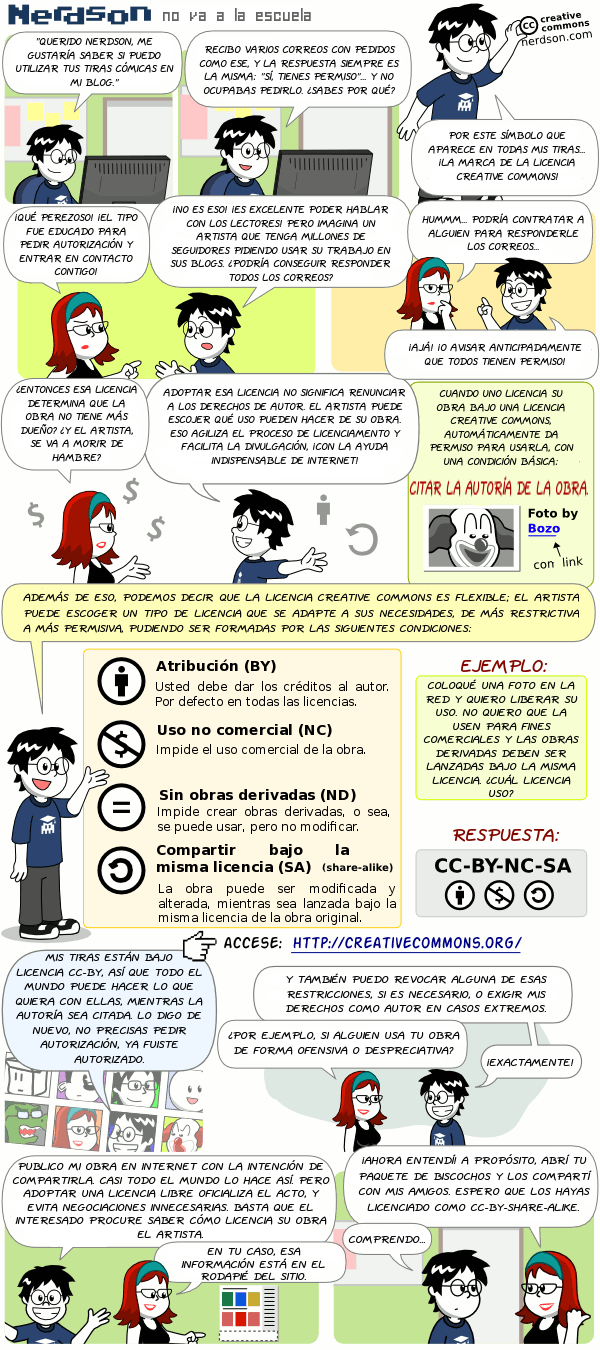 Una excelente tira cómica (cortesía de “Nerdson no va a la escuela”) sobre las licencias Creative Commons